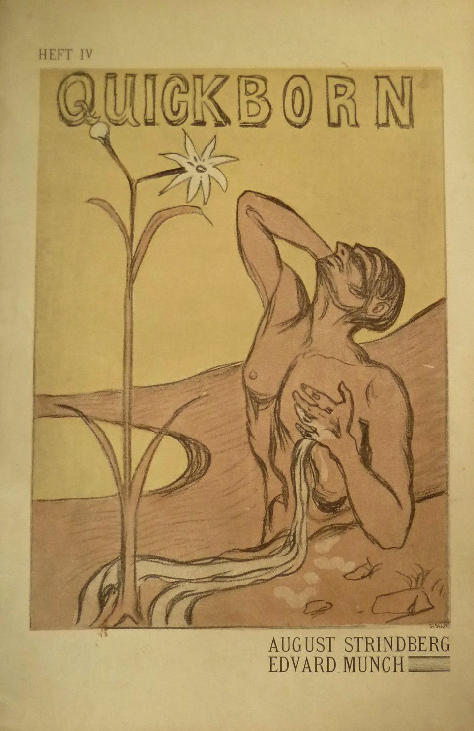 Quickborn. Heft 4, hrsg von William Wauer: August Strindberg und Edvard Munch, Berlin, Deutscher Kunstverlag A.G., 1899